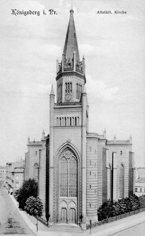 Altstädtische Kirche in Königsberg